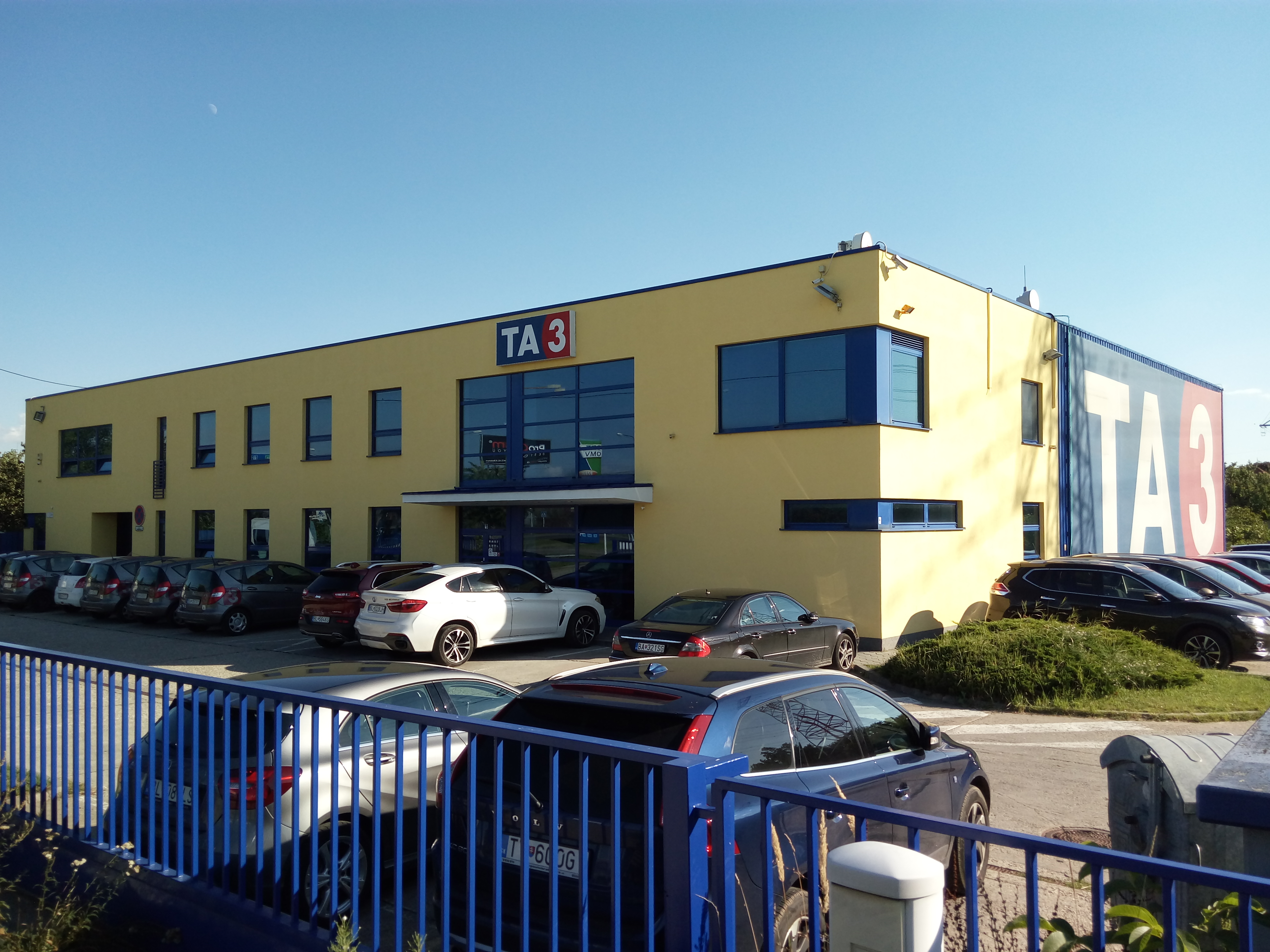 Gagarinova 12, Ružinov, Bratislava